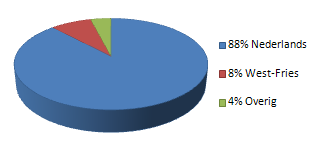 Taalgebruik in West-Friesland.